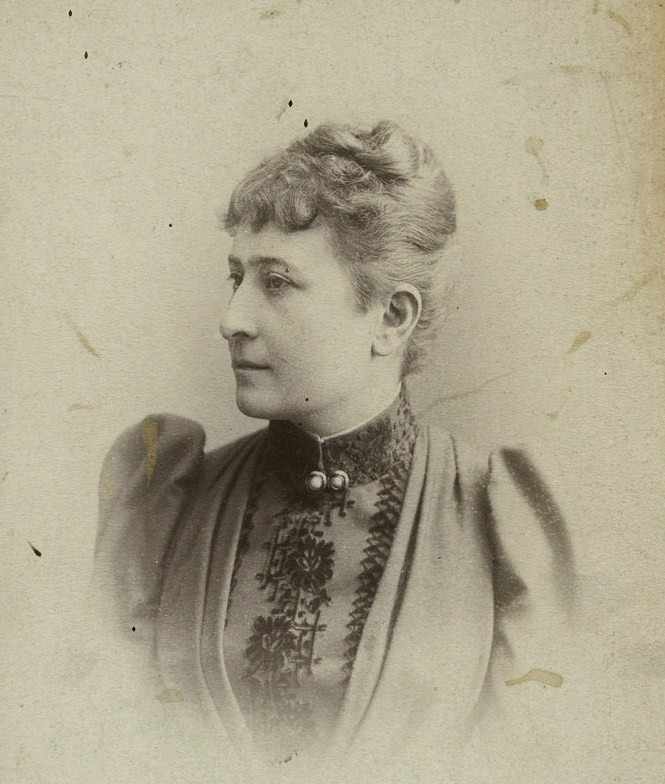 Княгиня Прасковья Александровна Сайн-Витгенштейн-Берлебург, ур Дадиани (1847—1919)